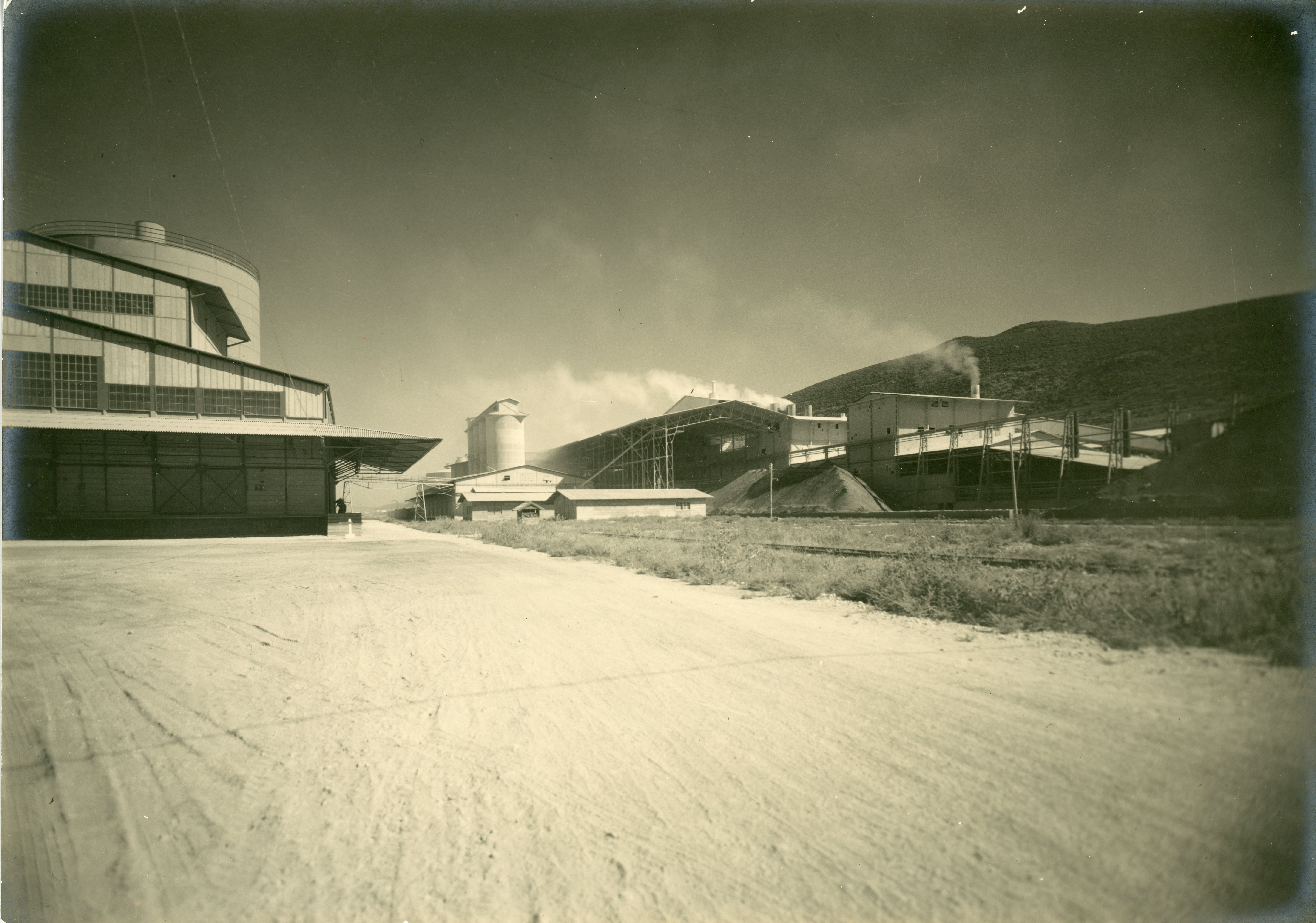 מתקנים ומבנים בתהליכי הייצור של המלט בבית חרושת נשר למלט השוכן ביישוב נשר